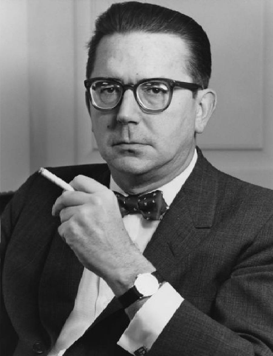 Рекламист